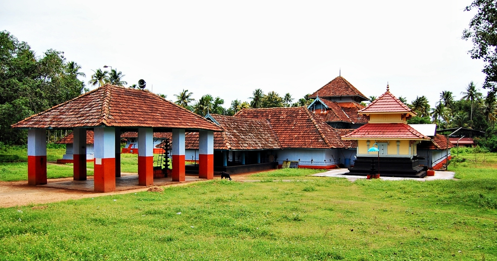 Trikkulashekarapuram Srikrishna temple